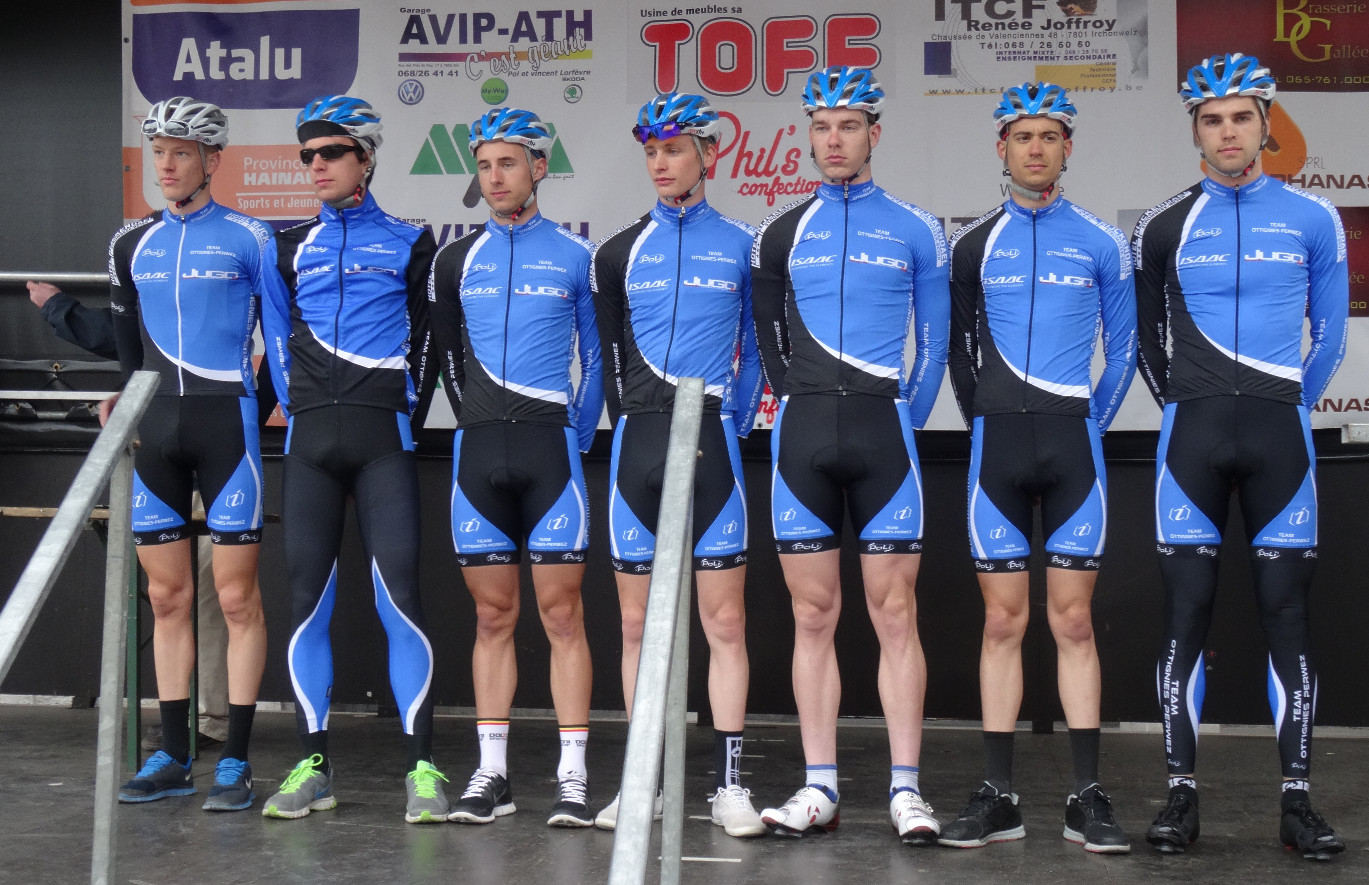 Triptyque des Monts et Châteaux 2014, étape 1, 4 avril 2014, départ d'Antoing. The creation of these files was made possible thanks to the organizers of the Triptyque des Monts et Châteaux 2014 English | français | +/− Depicted team: Ottignies-Perwez The creation of these files was made possible thanks to the organizers of the Triptyque des Monts et Châteaux 2014 English | français | +/−